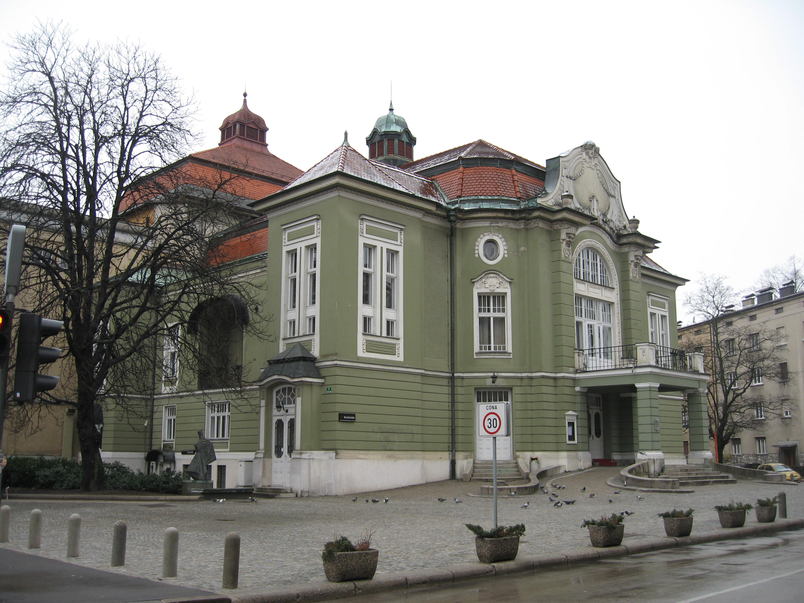 green house